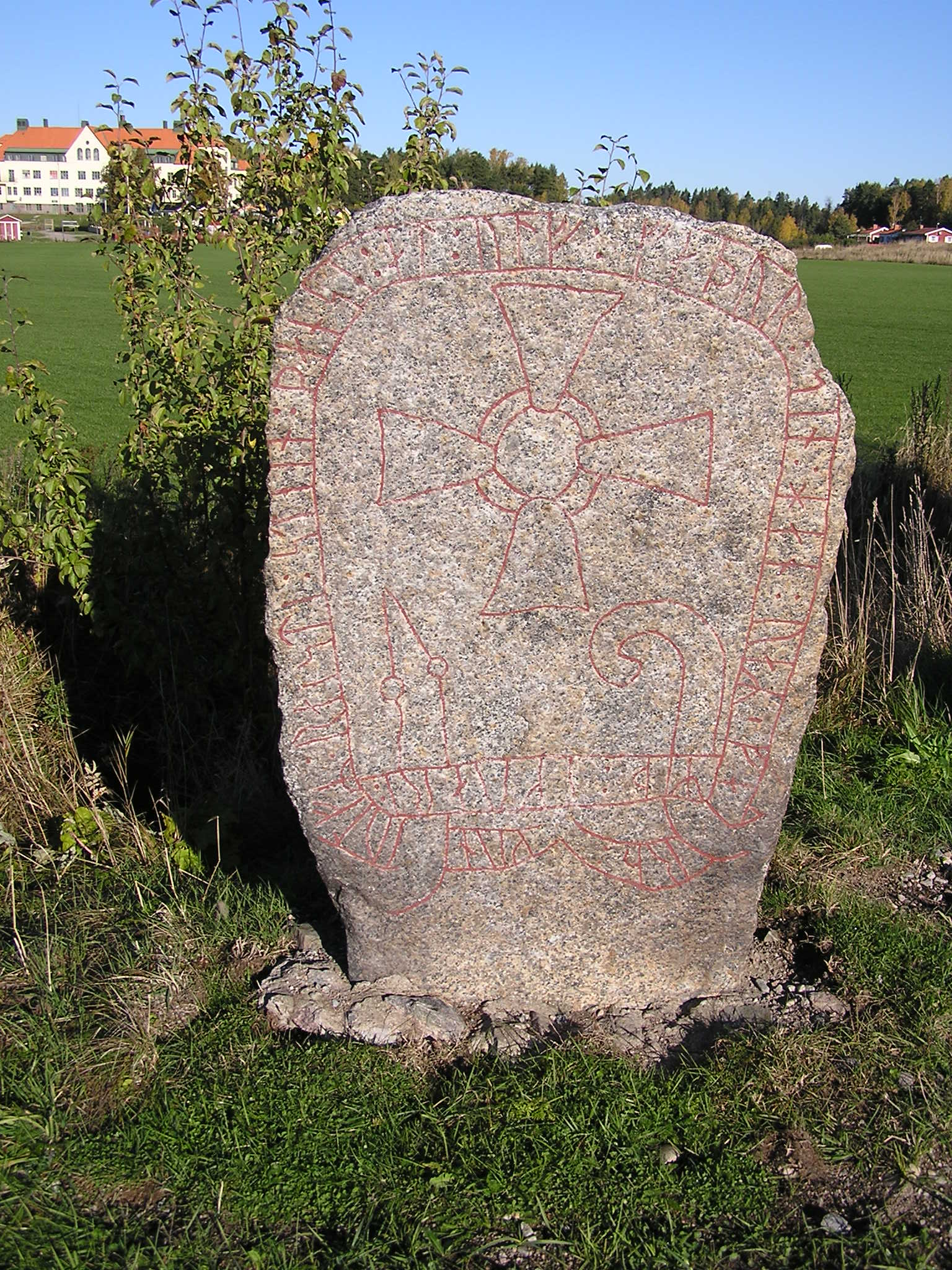 Sö108 Gredby Etuna